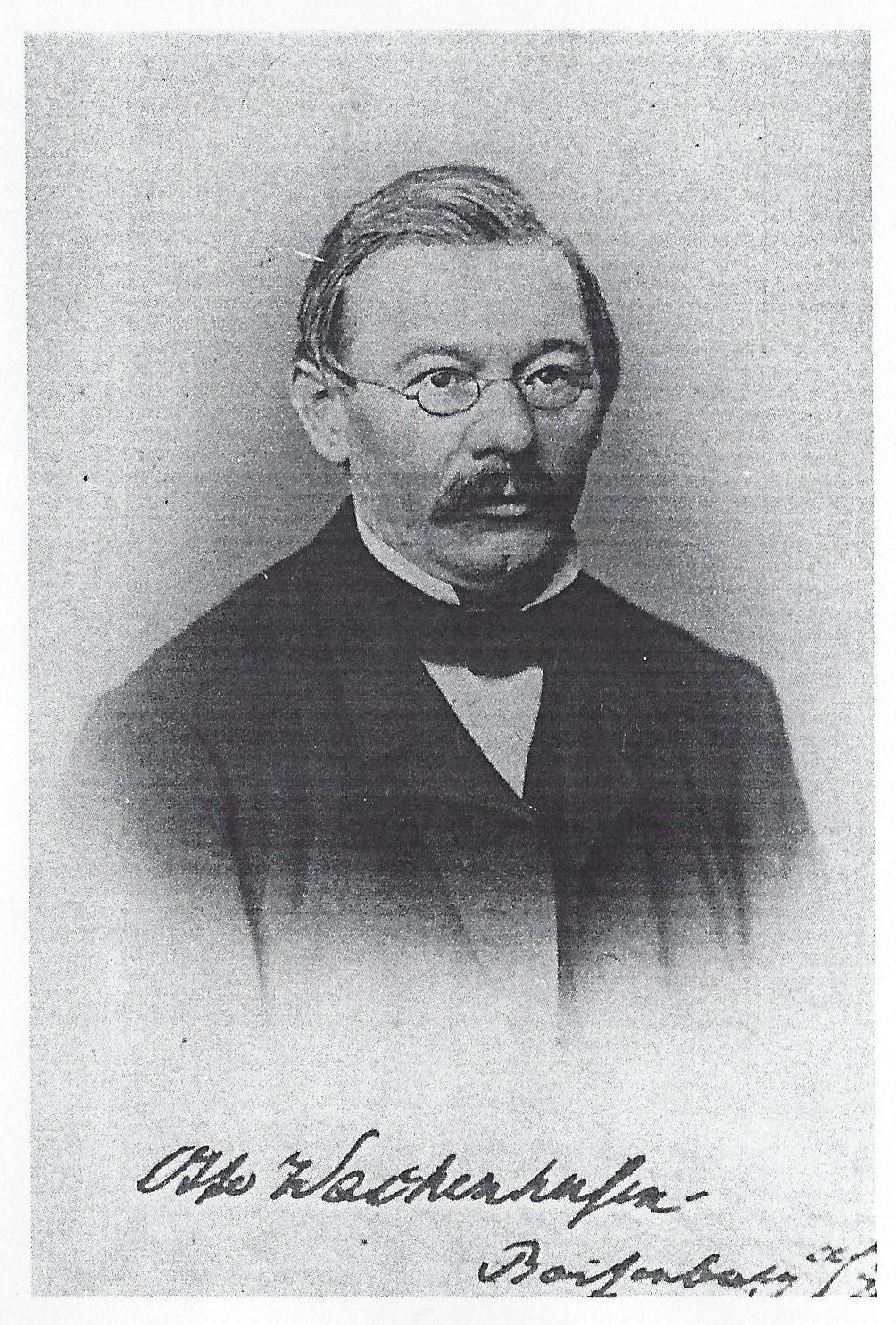 Signierte Porträtfotografie von Otto Wachenhusen (1820-1889)